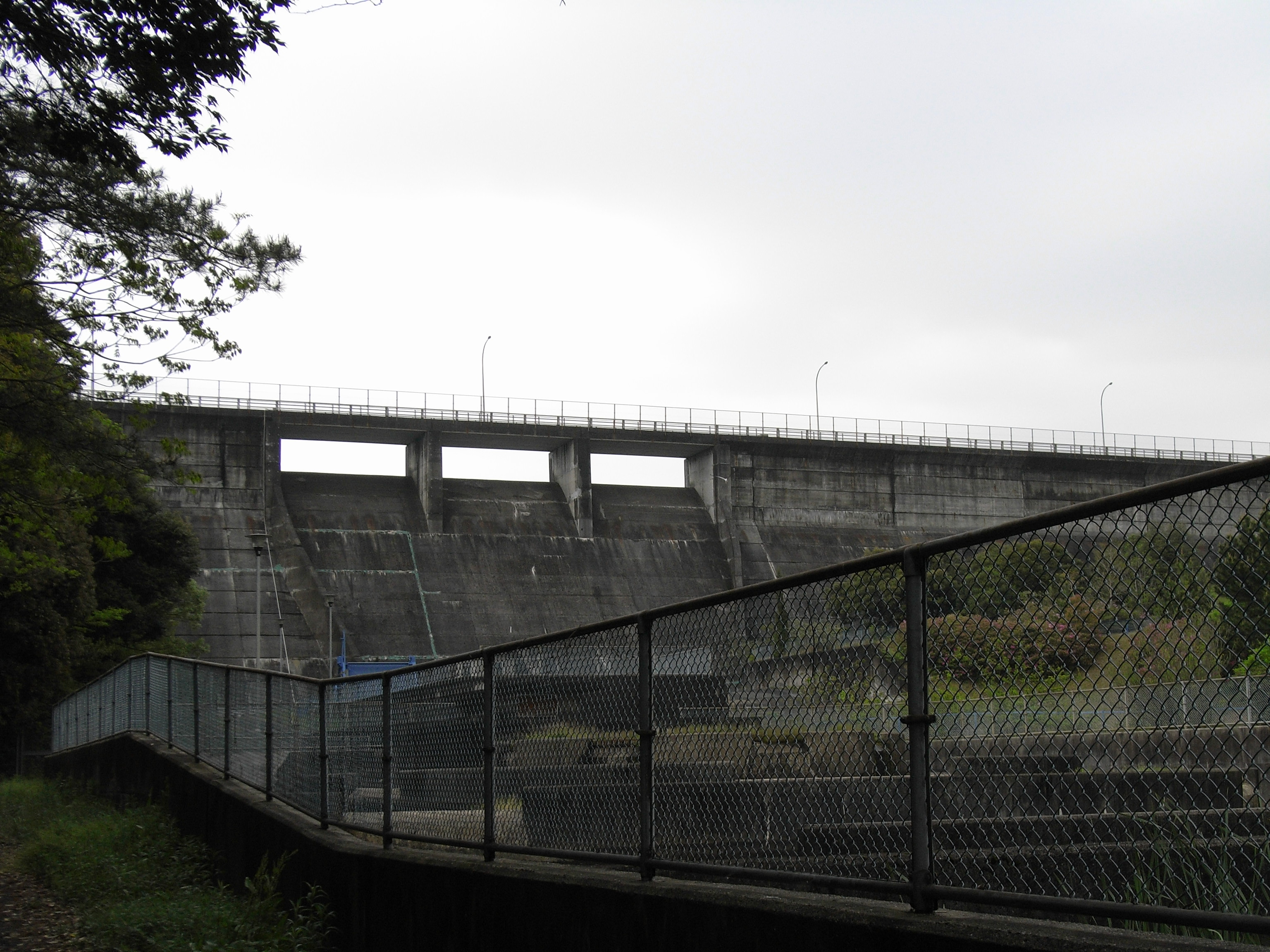 Dam